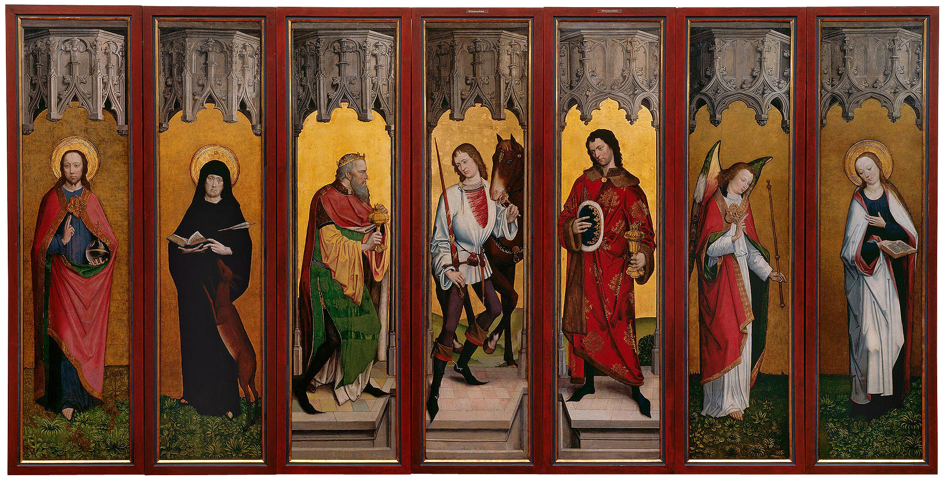 MeisterGeorgslegende Polyptyque WRM 0129-0135